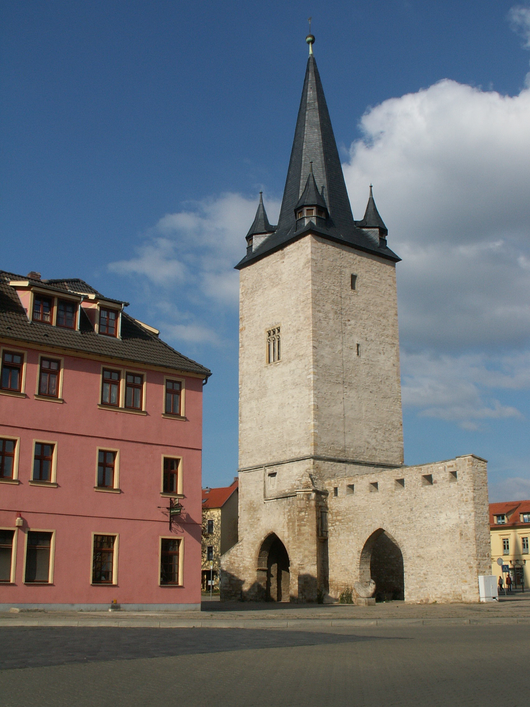 Johannisturm in Aschersleben